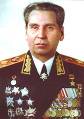 Николай Васильевич Огарков (1917 — 1994) — советский военачальник, Маршал Советского Союза